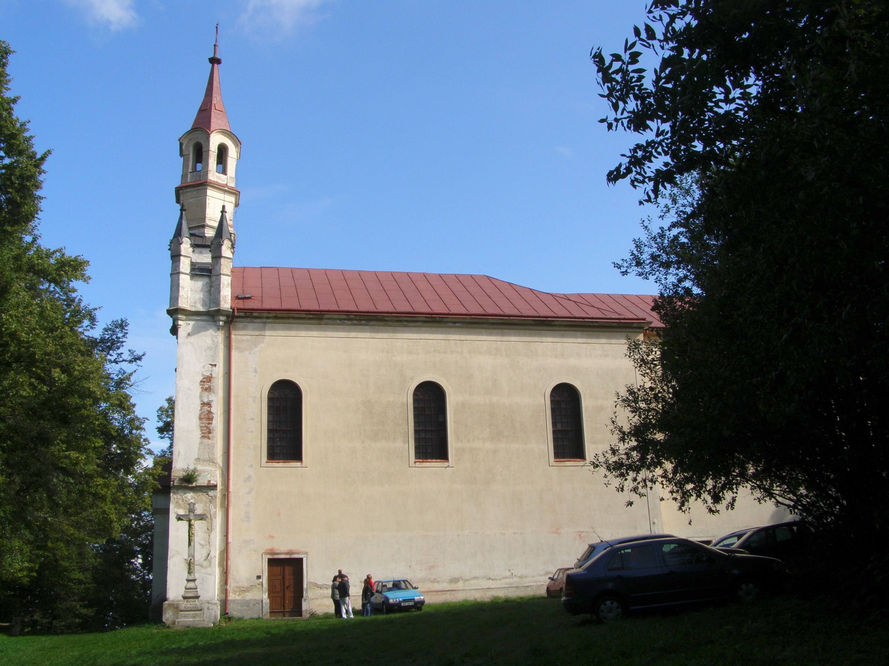 Cizkrajov, část Mutná, poutní kostel Panny Marie Bolestné, zvaný Montserrat